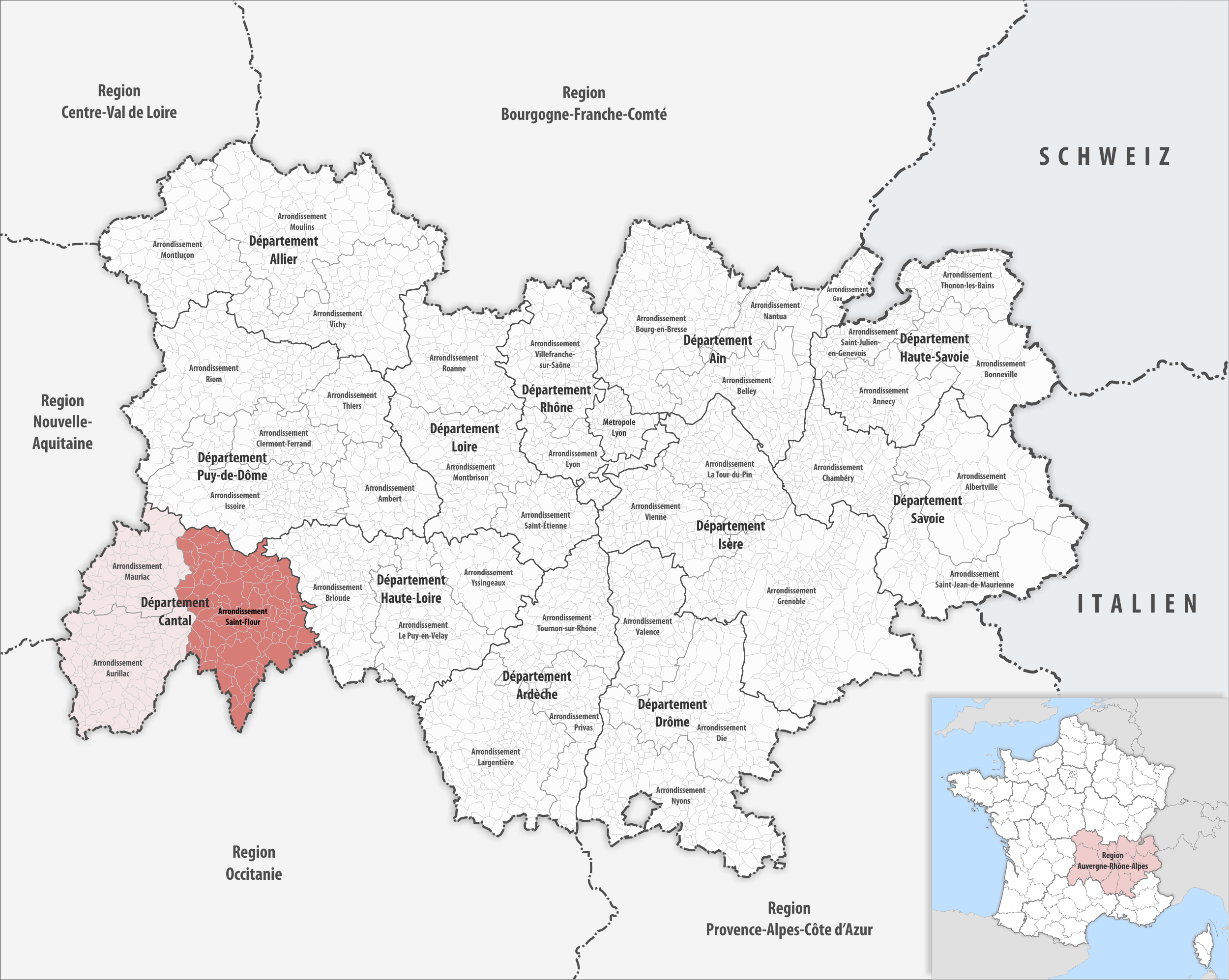 Lage des Arrondissements Saint-Flour